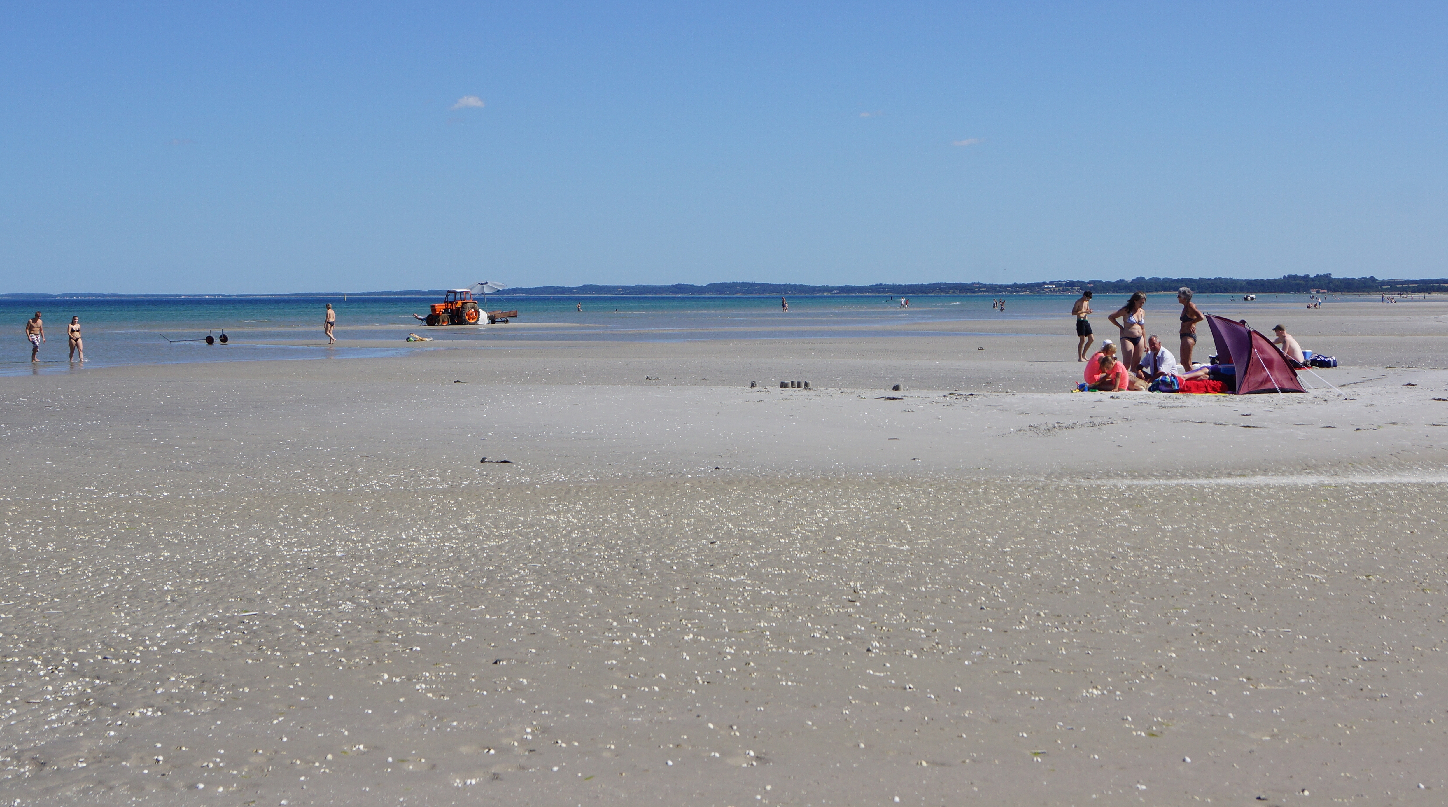 St. Sjørup Strand